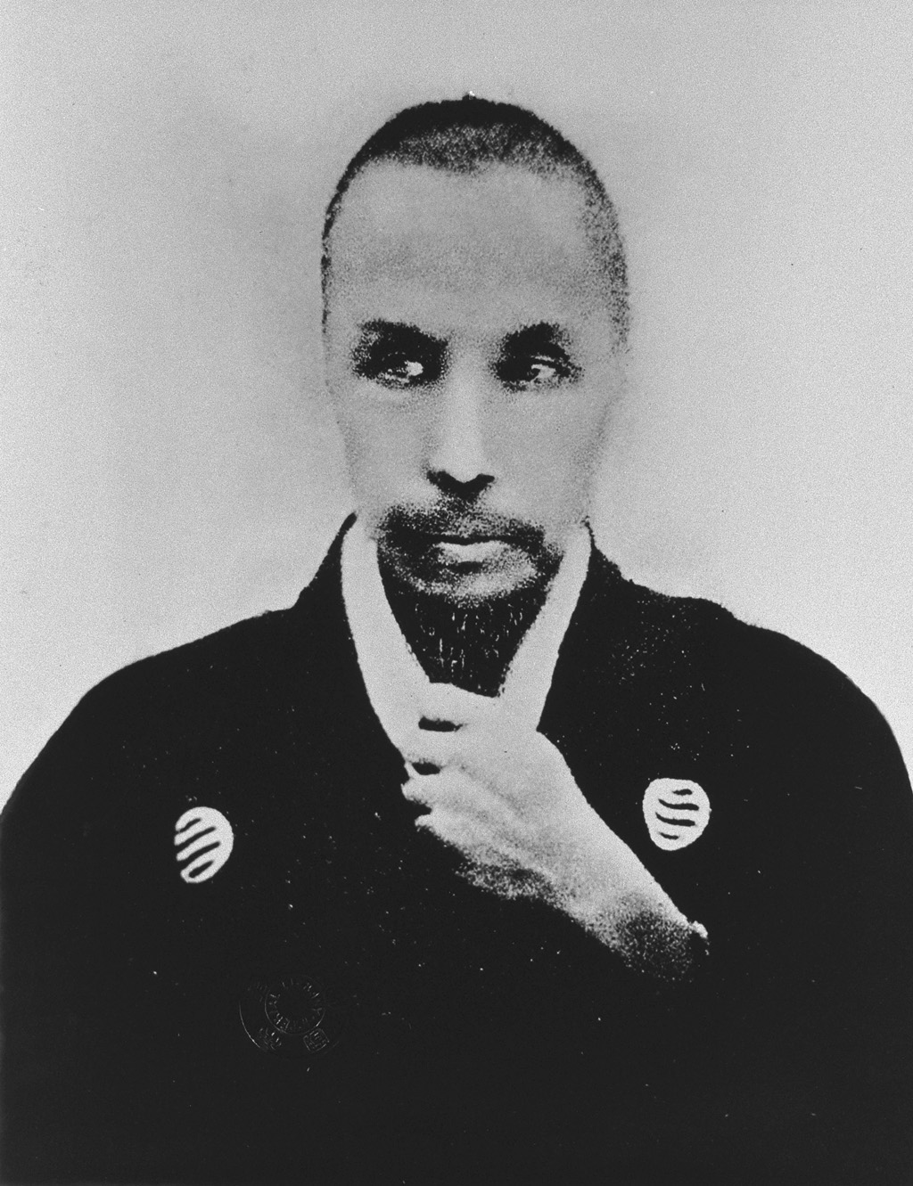 Portrait of Sakuma Shozan (佐久間象山, 1811 – 1864)